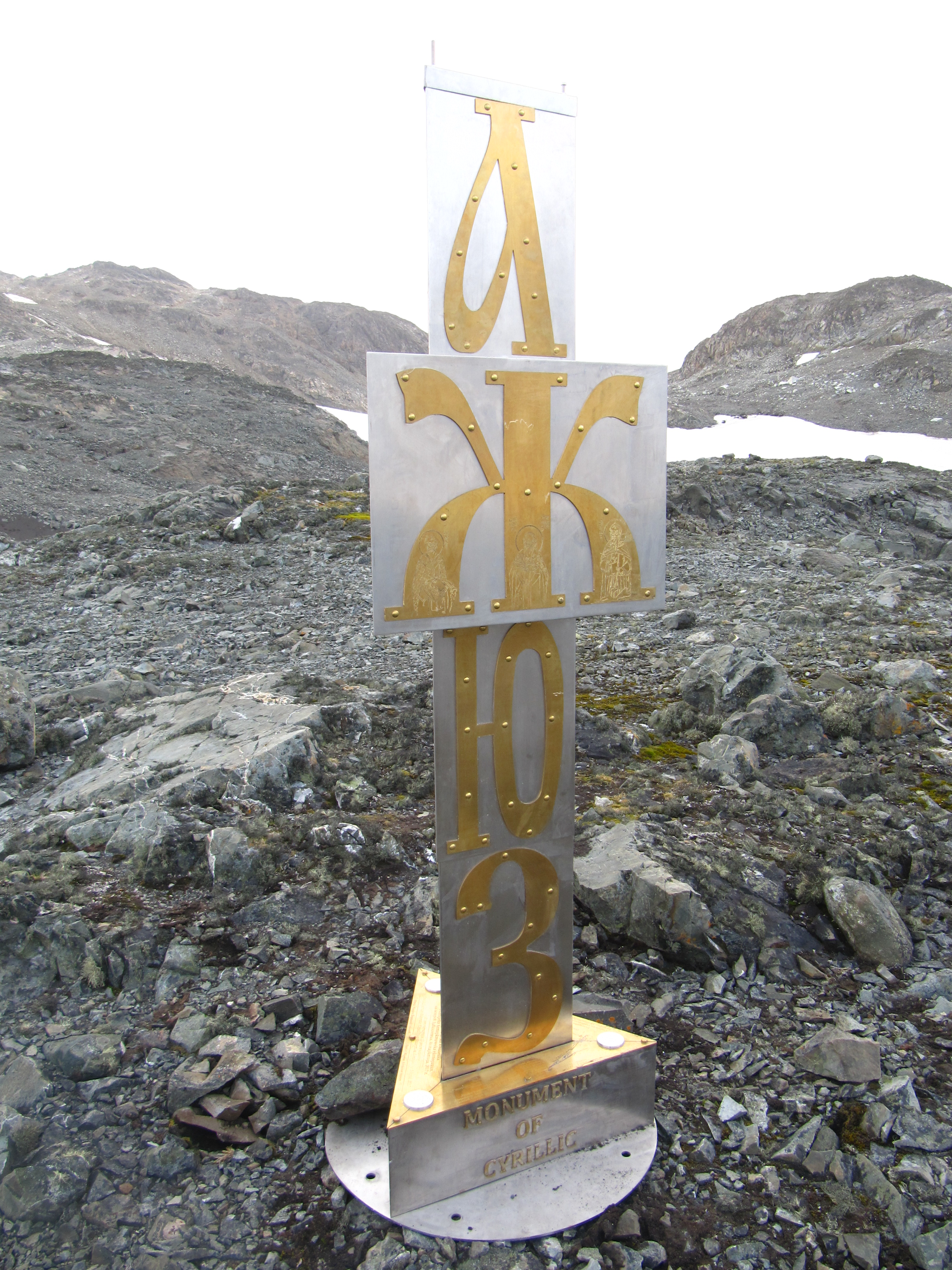 The Monument to the Cyrillic Script erected under a joint Bulgarian-Mongolian project at the Bulgarian base in Antarctica on 3 March 2018